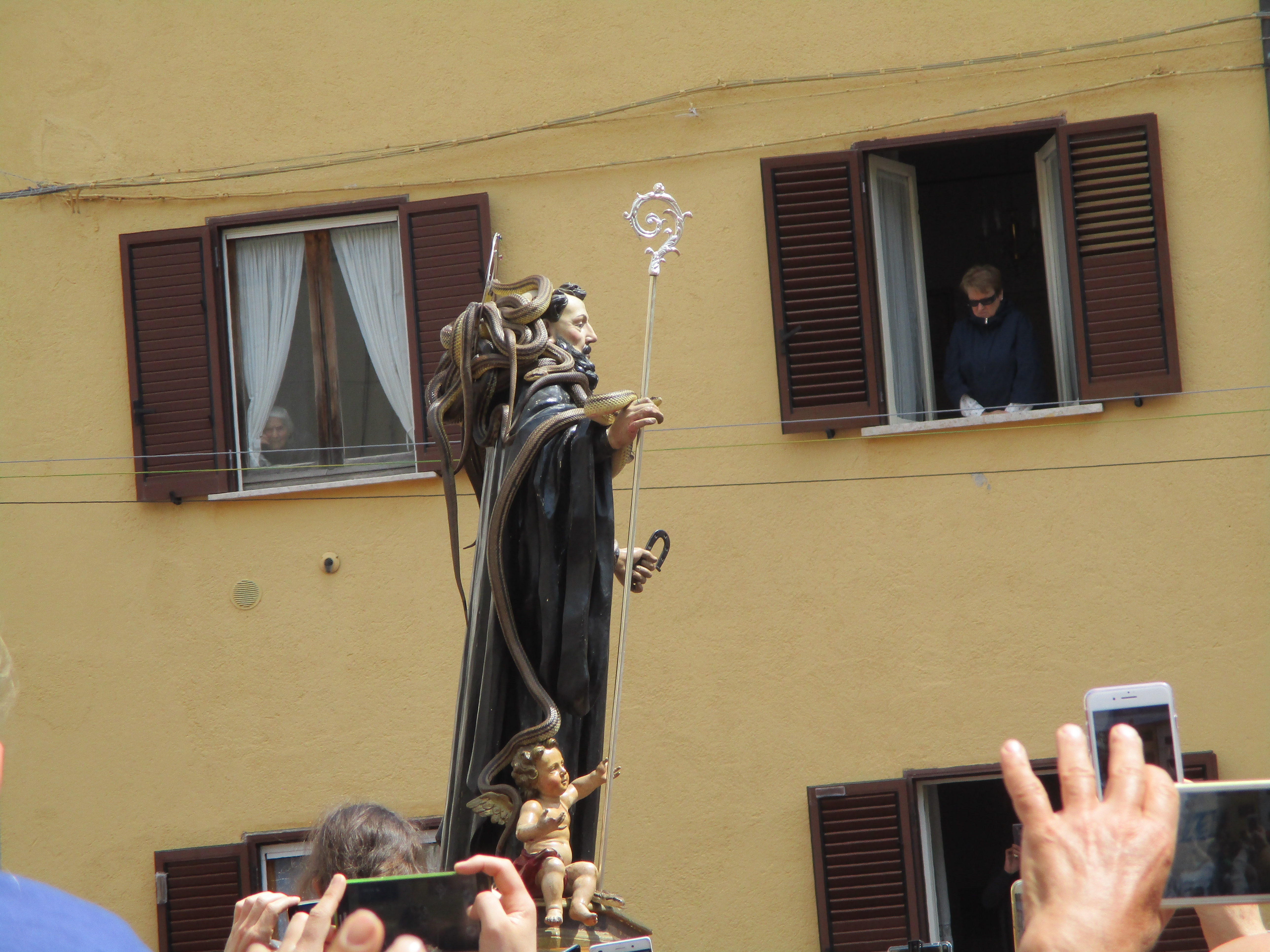 Statua di San Domenico avvolta dalle serpi durante la processione di Cocullo